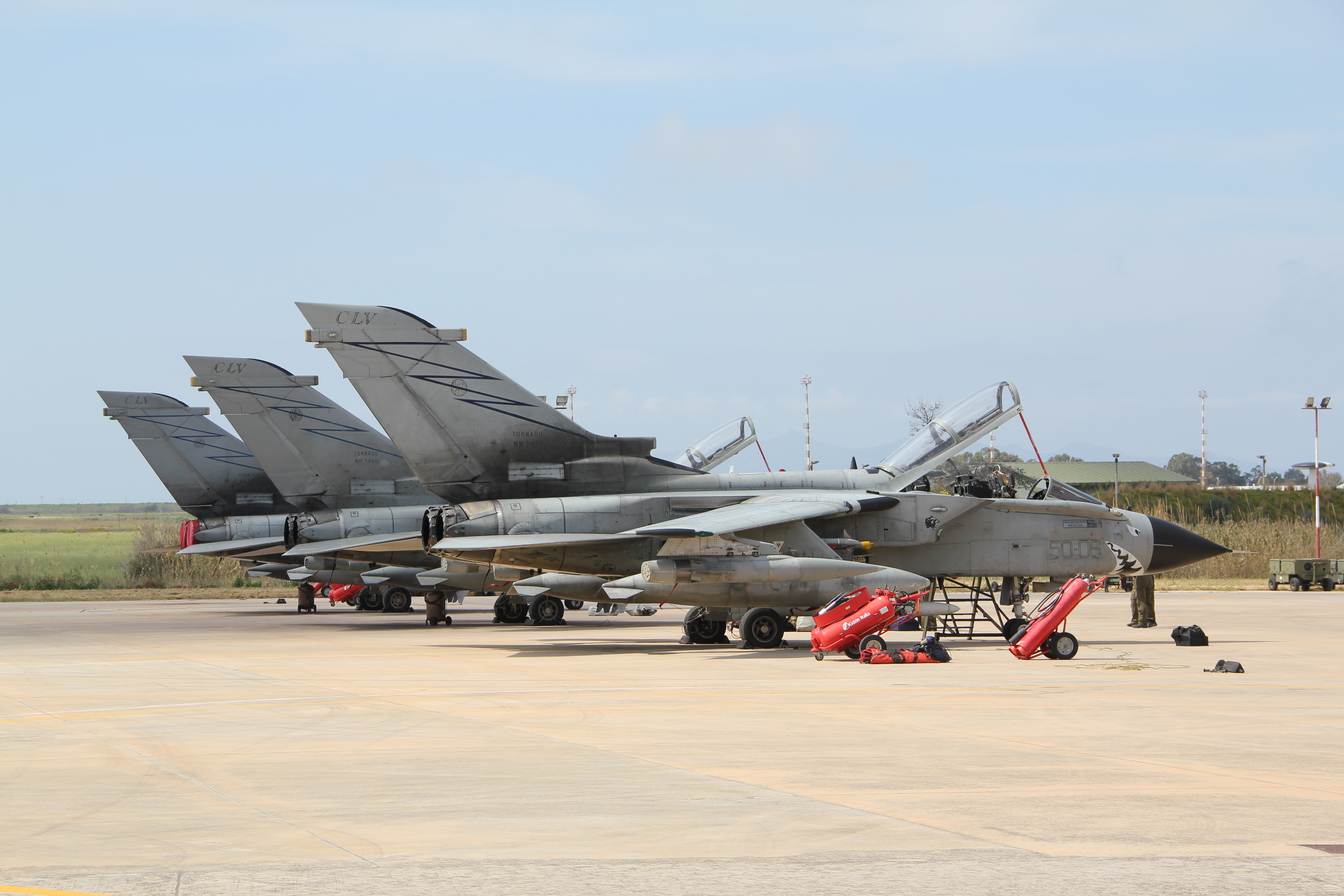 tornado del 155° Gruppo del 50° Stormo schierati all'aeroporto di Trapani Birgi pronti per una missione nell'ambito dell'Operazione Unified Protector